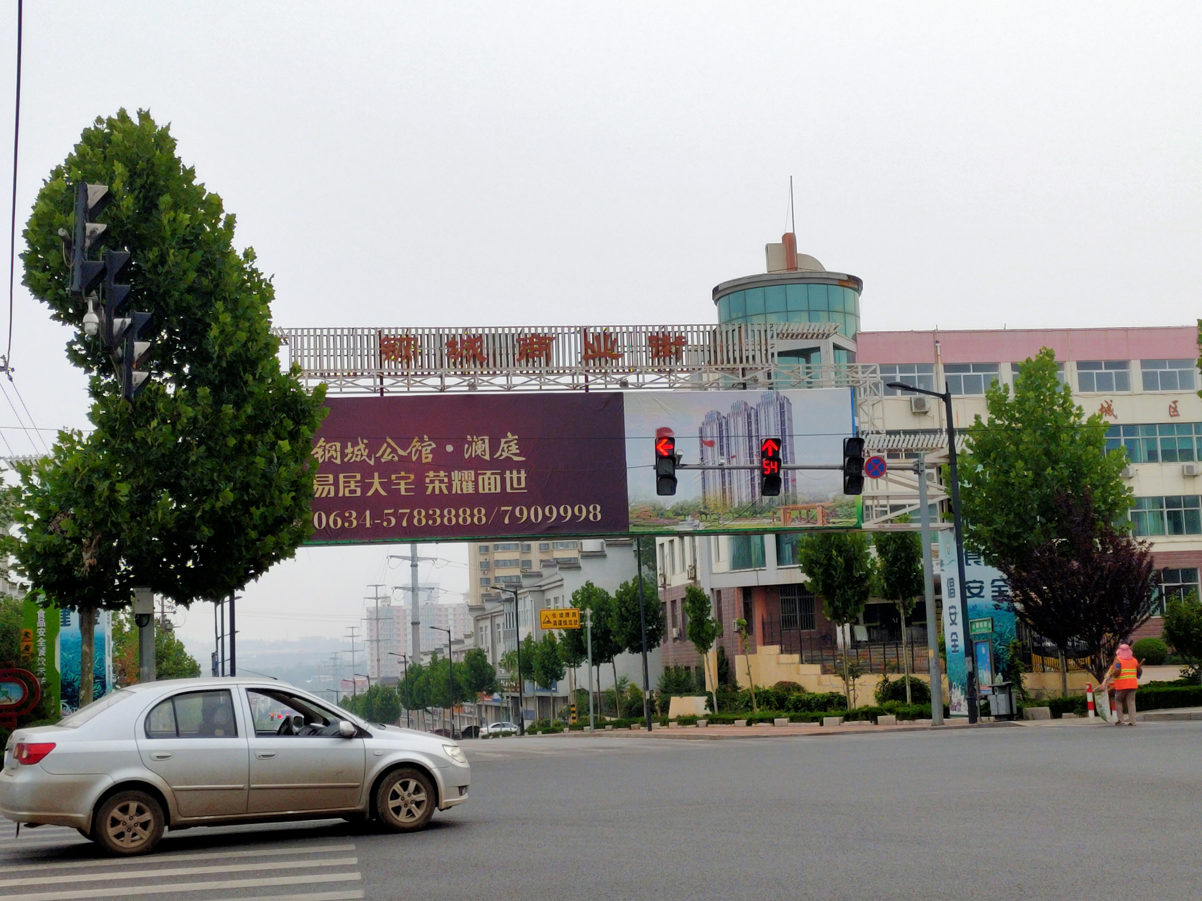 济南市钢城区